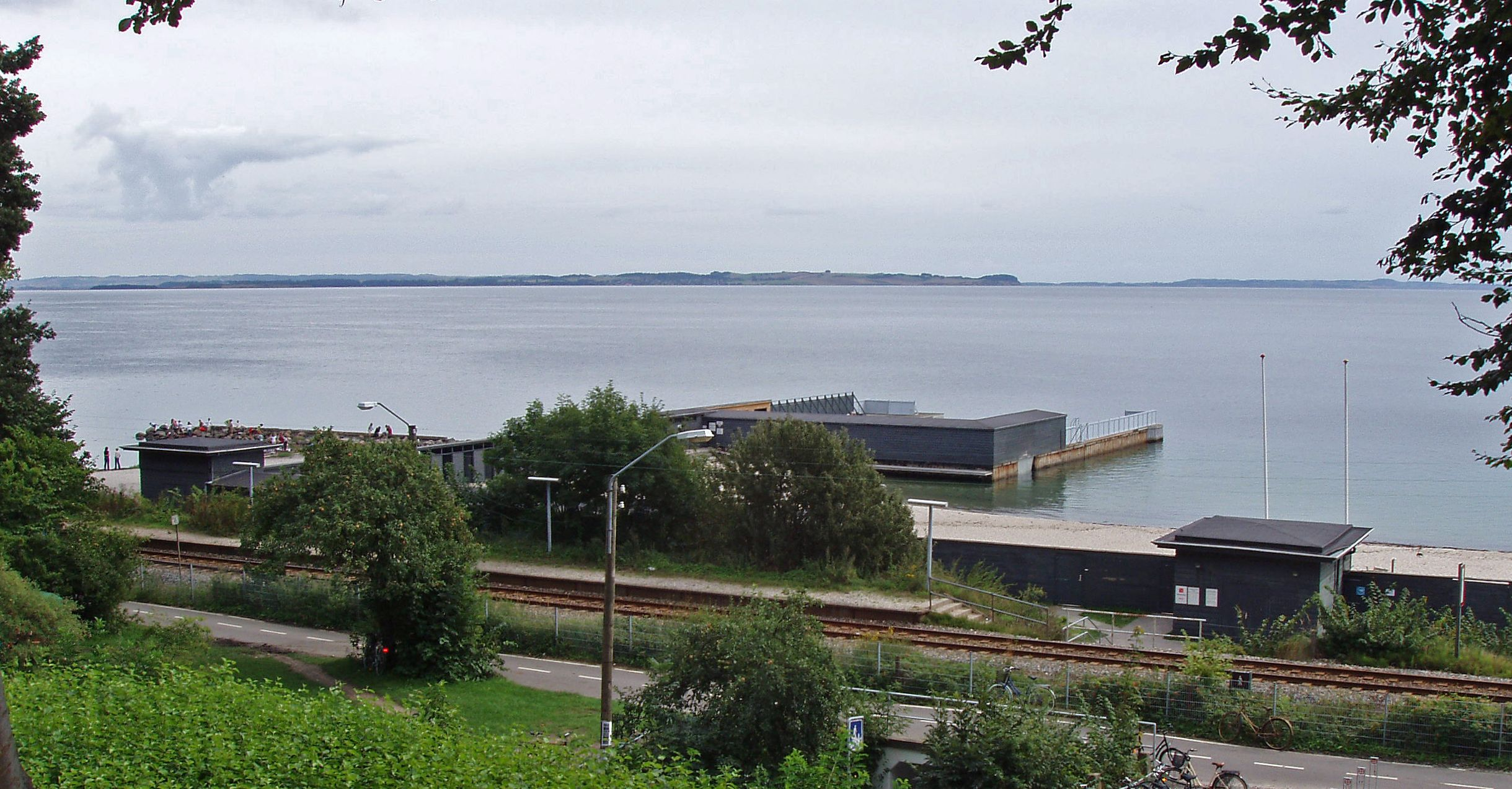 Århusbugten set fra Riis Skov ved Den Permanente